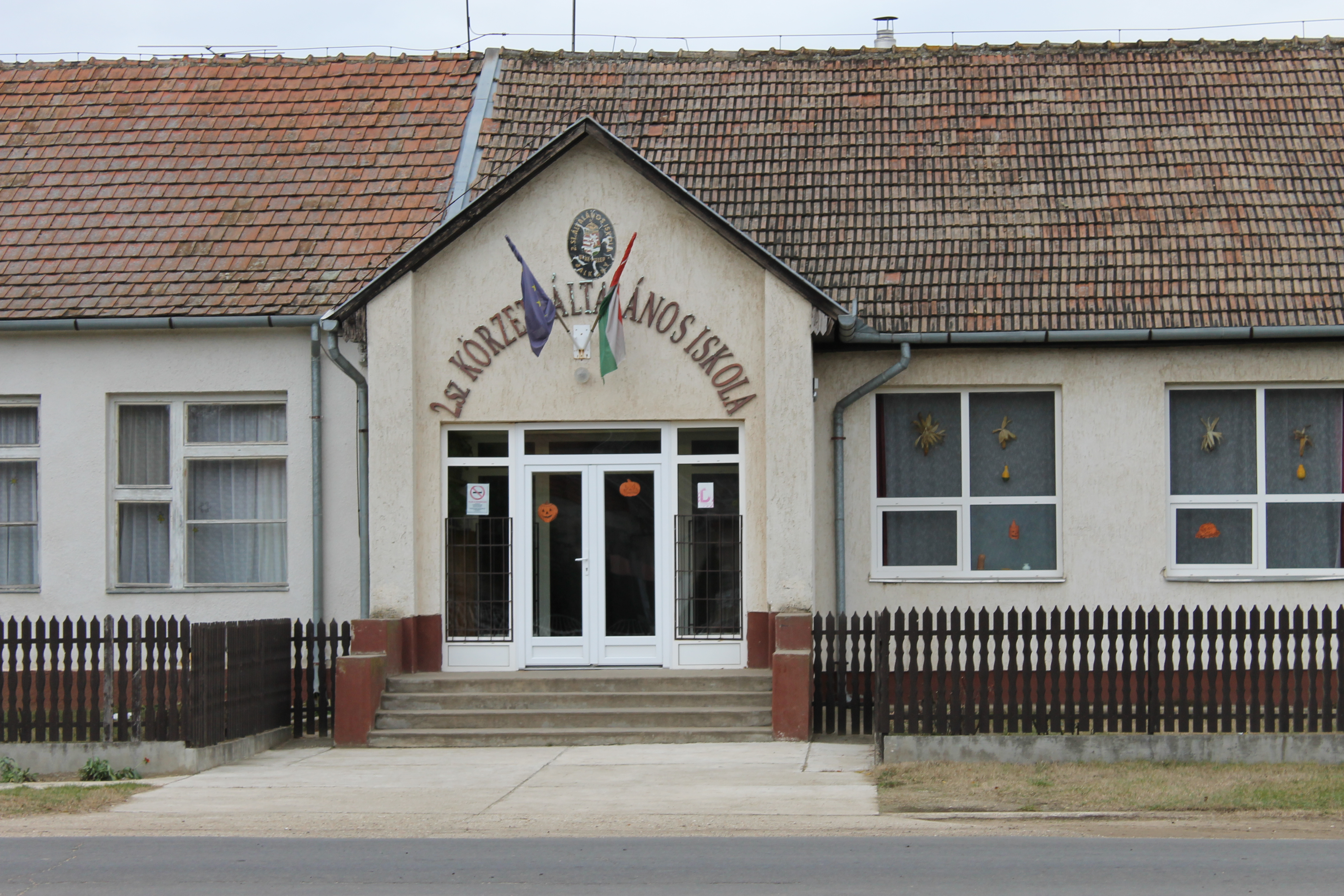 Béketelepi 2. számú körzeti általános iskola